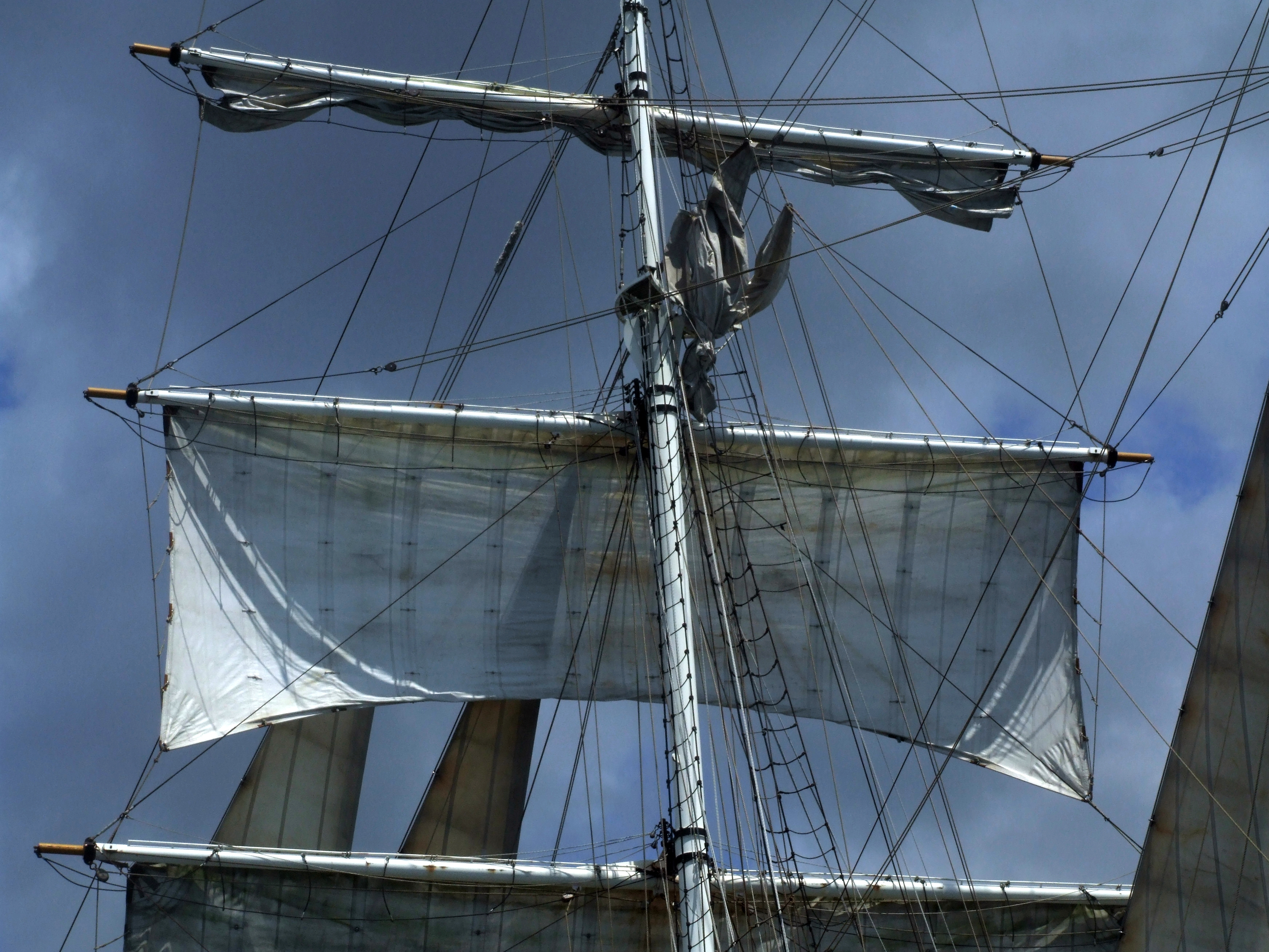 Les Tonnerres de Brest 2012 : Huniers du Thalassa